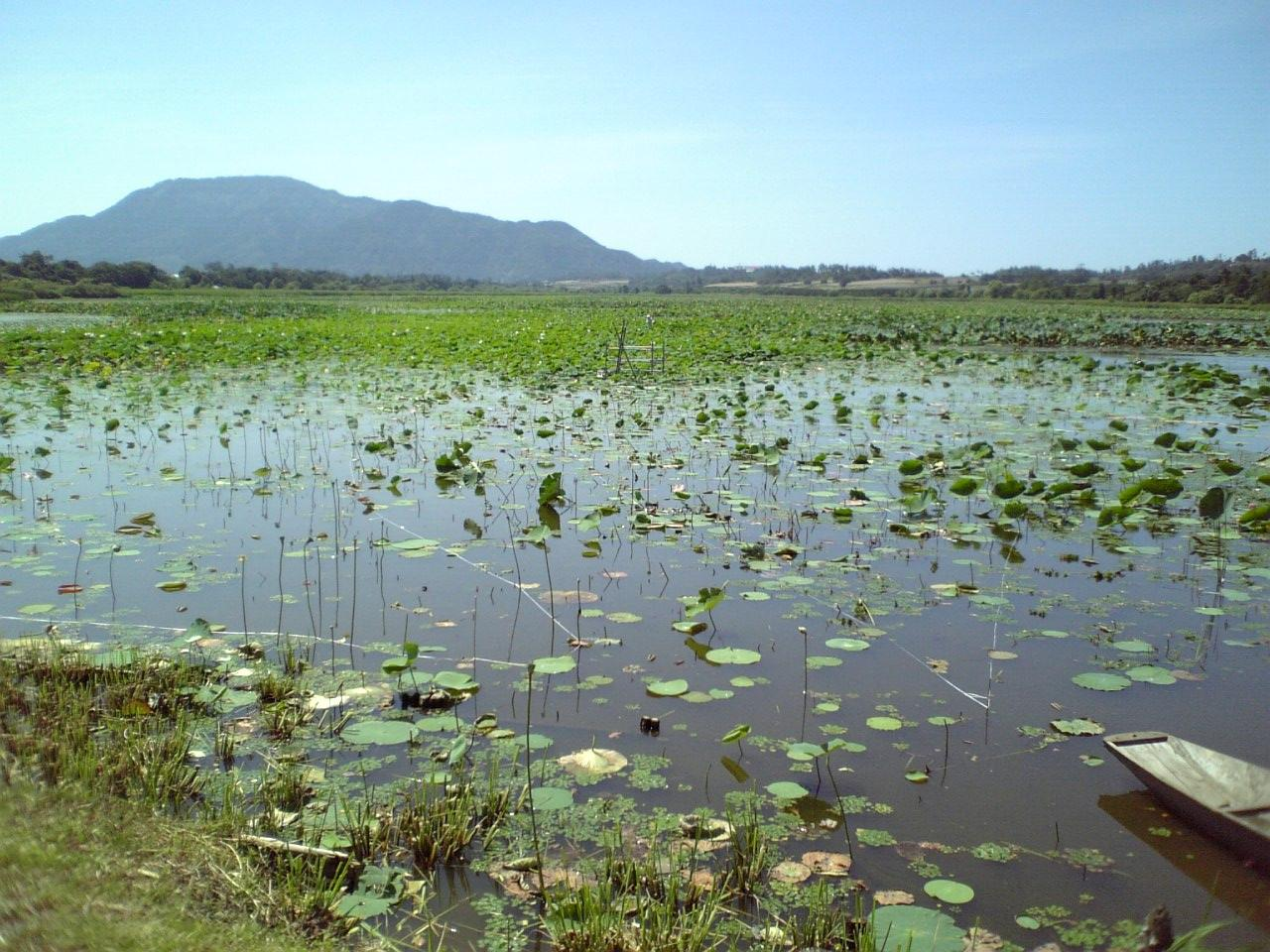 佐潟公園より望む 2007.8.25投稿者本人により撮影。